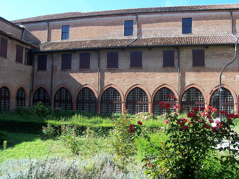 Ferrara - Chiostro del Monastero di S. Antonio in Polesine